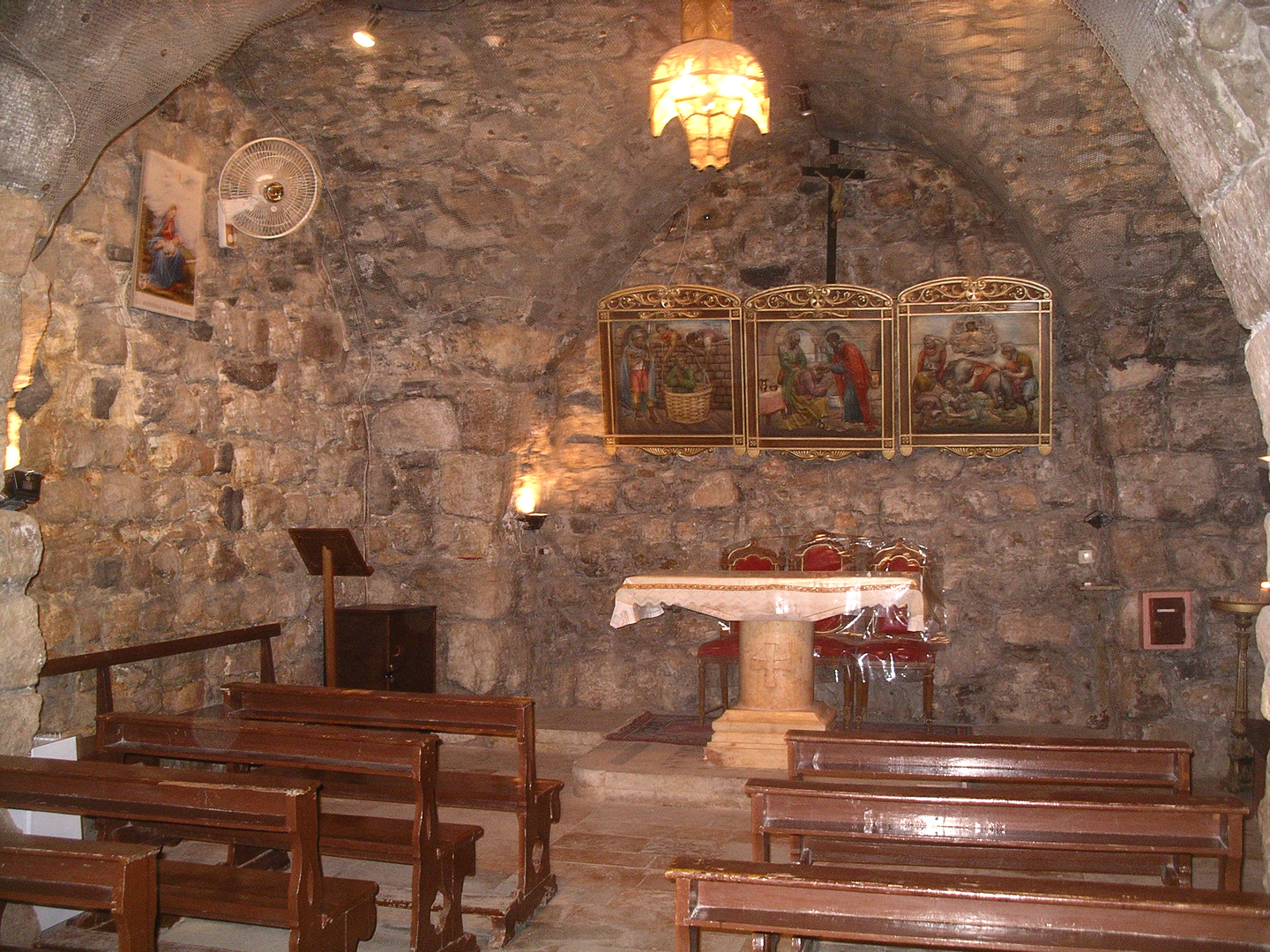 Supuesta casa de Ananías en Damasco Inside the house of St. Ananias in Damascus, Syria.